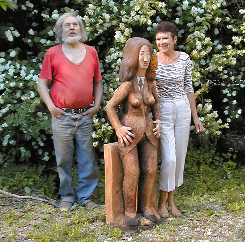 Pierre Merlier en bonne compagnie dont sa sculpture "George Sand".